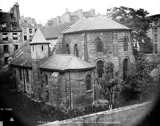 Côté sud-est